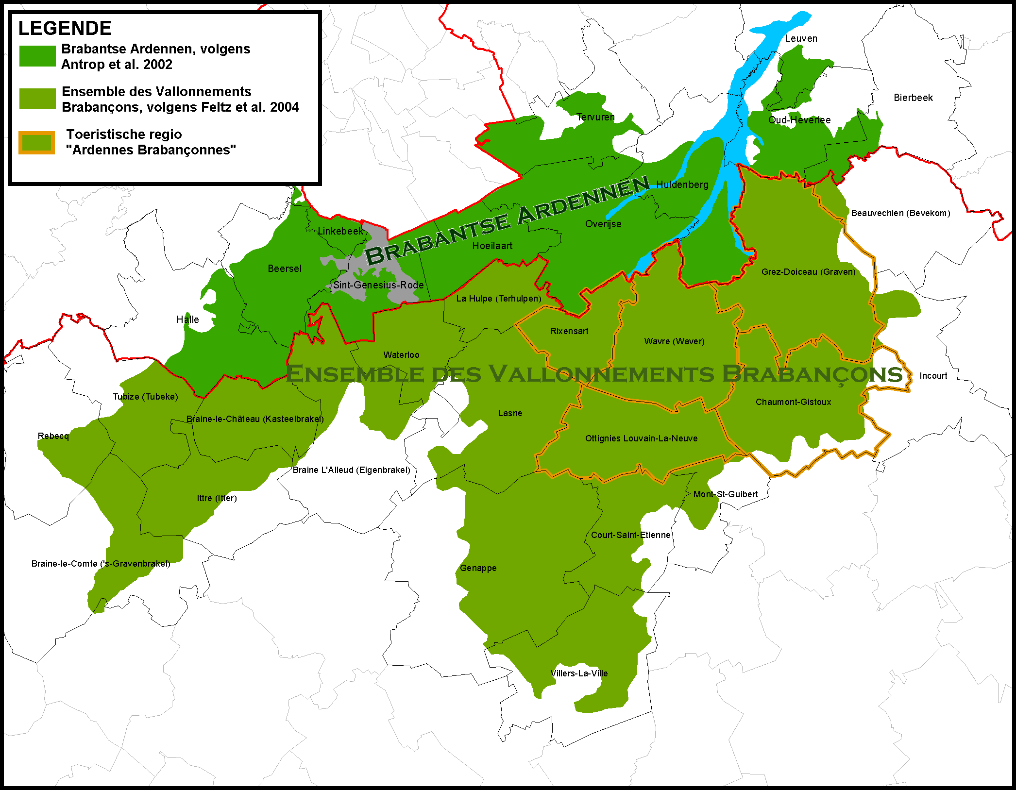 De landschapseenheid ligt verspreid over de twee gewesten (Vlaanderen en Wallonië) en wordt in twee studies anders genoemd: "Brabantse Ardennen" in de studie van Antrop et al. (2002), en "Ensemble des Vallonnements Brabançons" in de studie van Feltz et al. (2004).